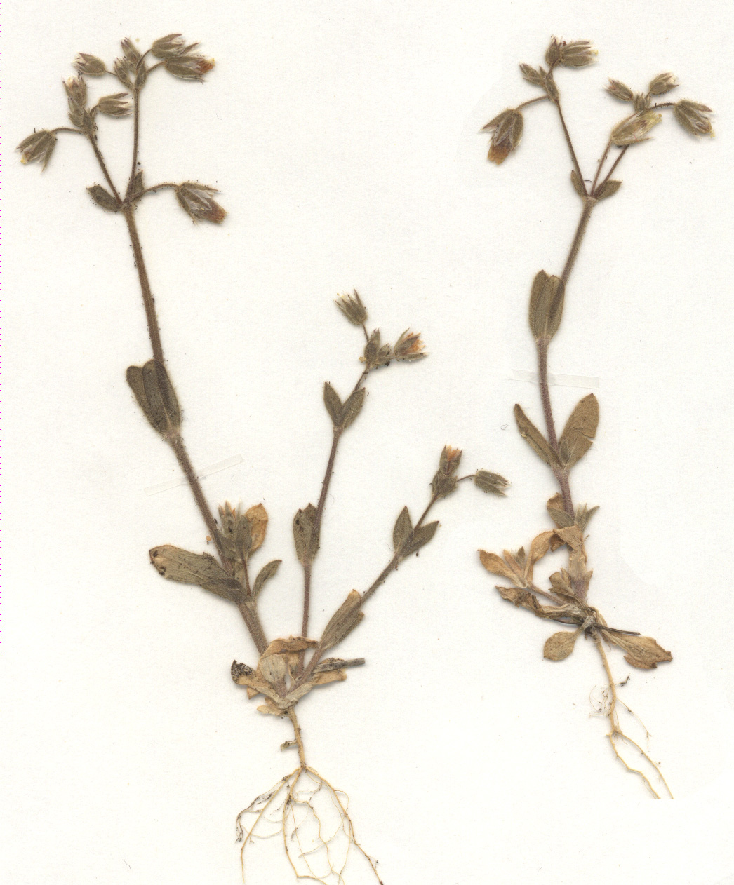 eigener Herbarbeleg von 1987, Unterfranken